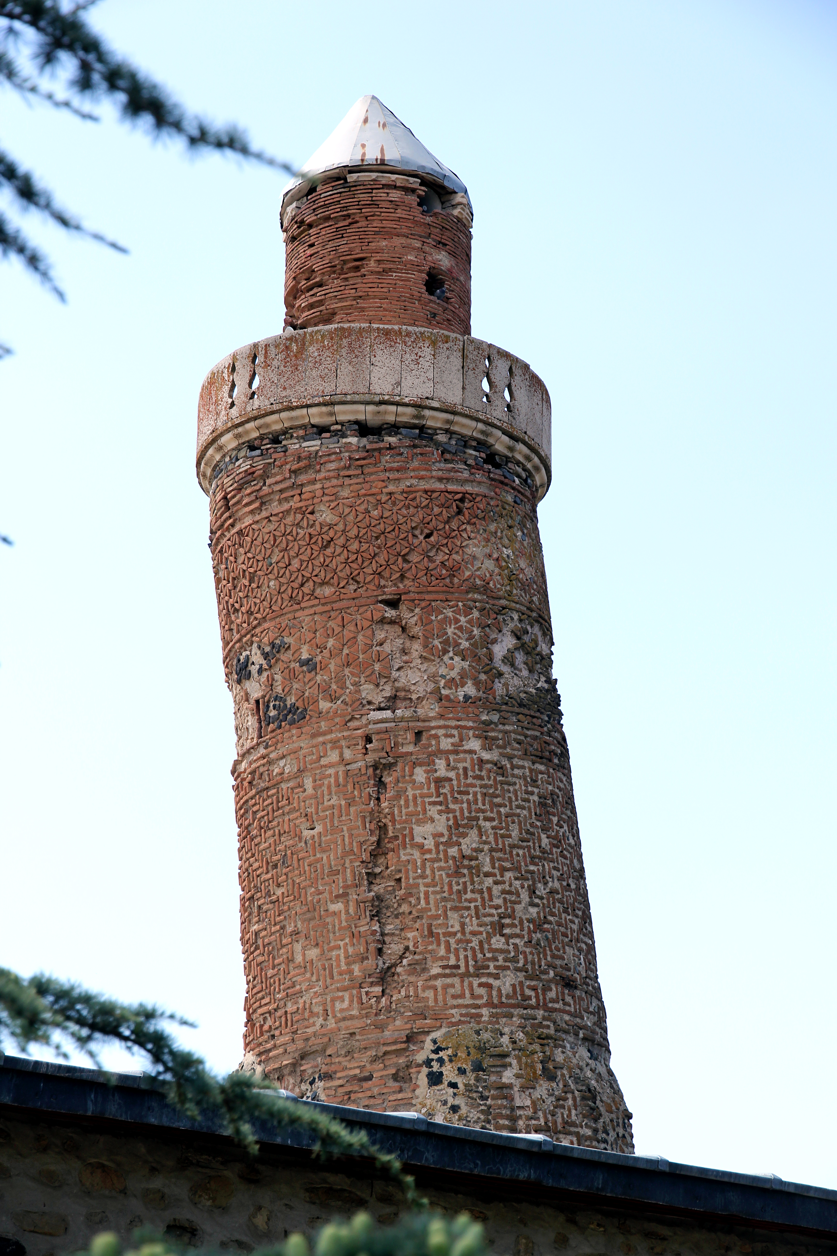 schiefes Minarett der Ulu Camii aus dem 12. Jahrhundert in Harput, Provinz Elâzığ, Türkei